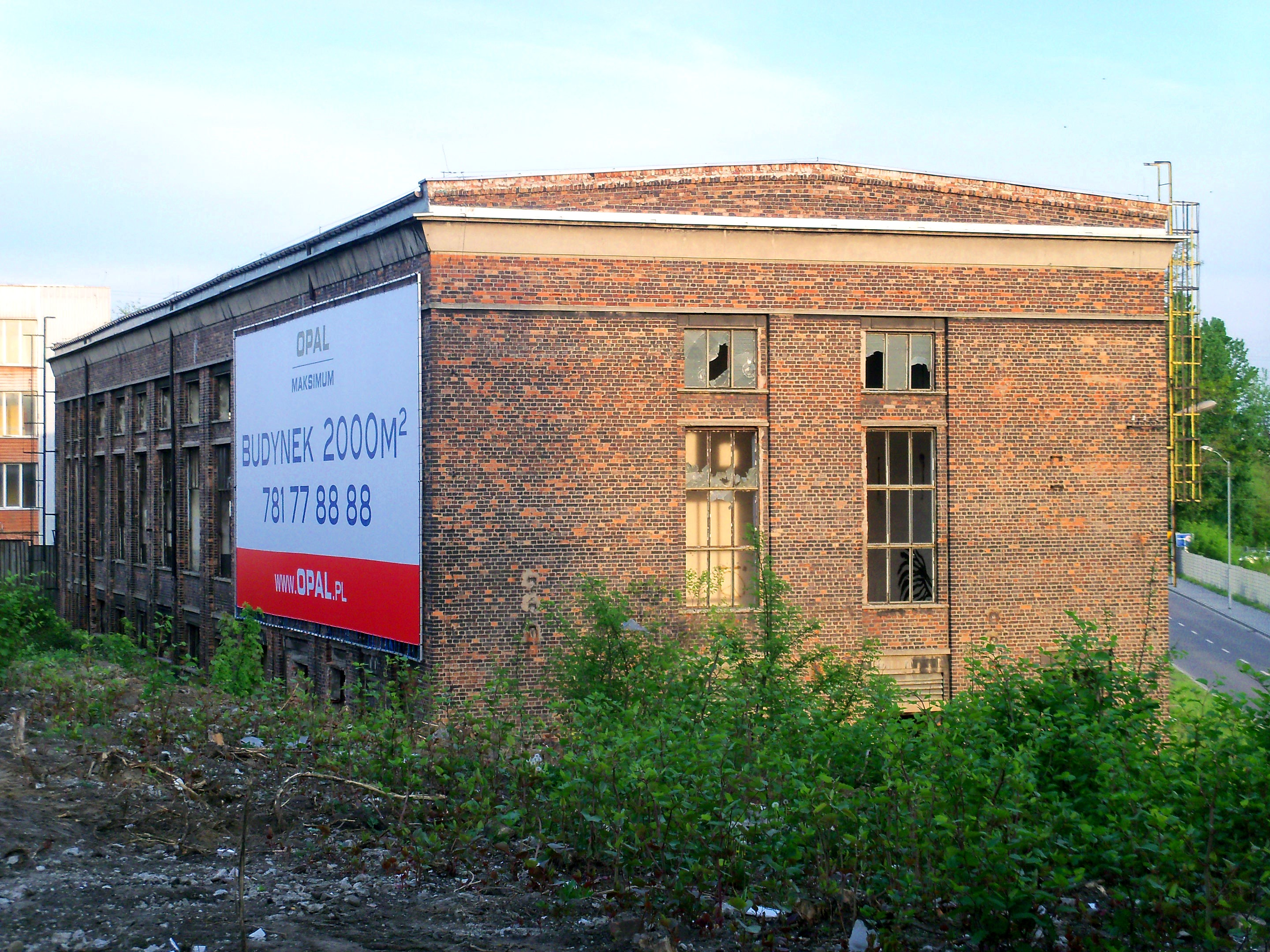 Huta Baildon w Katowicach